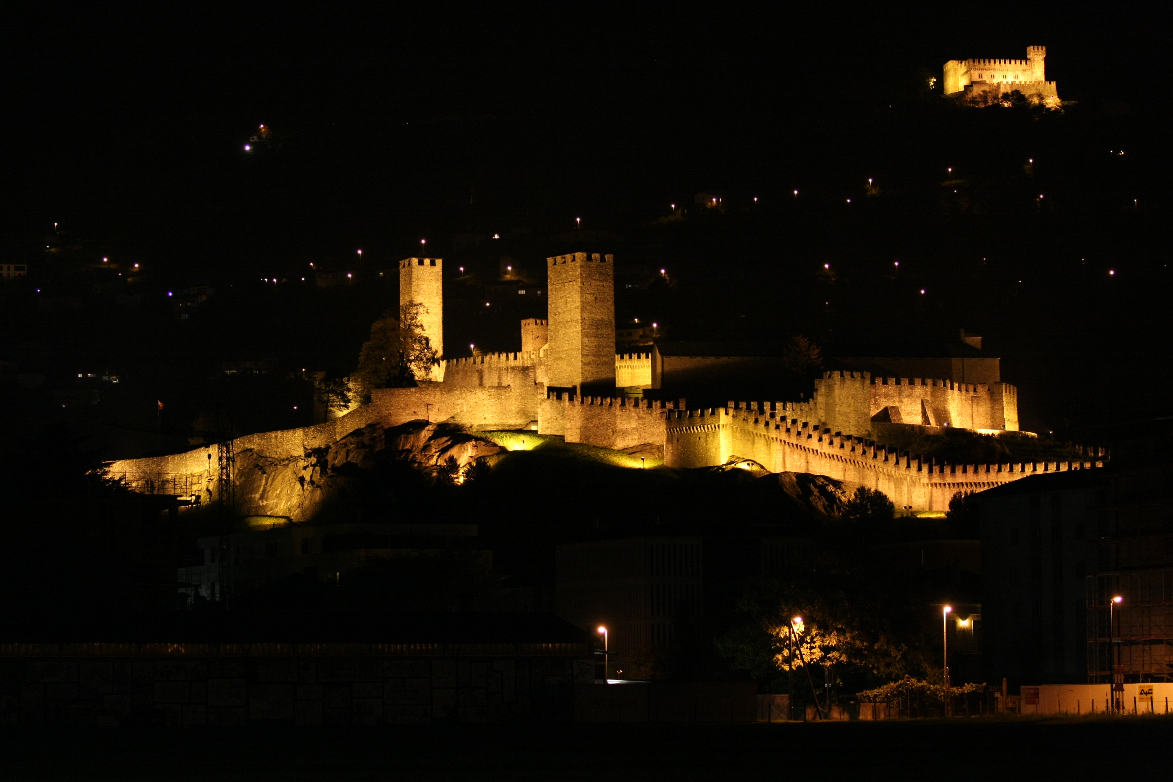 Castelgrande